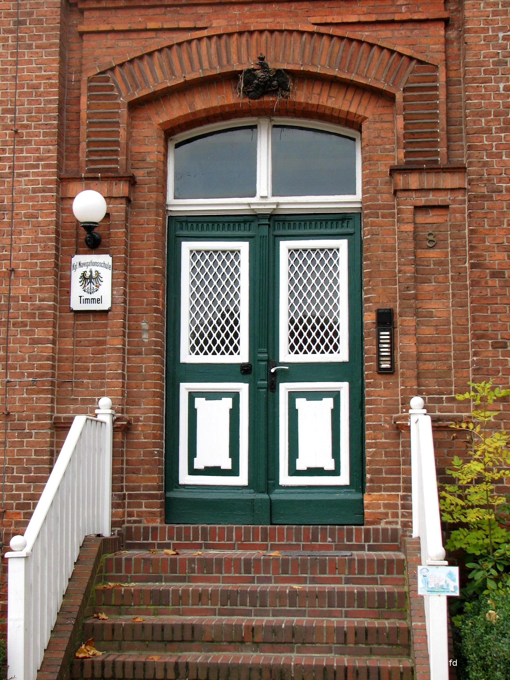 Eingang der Königlichen Navigationschule Timmel